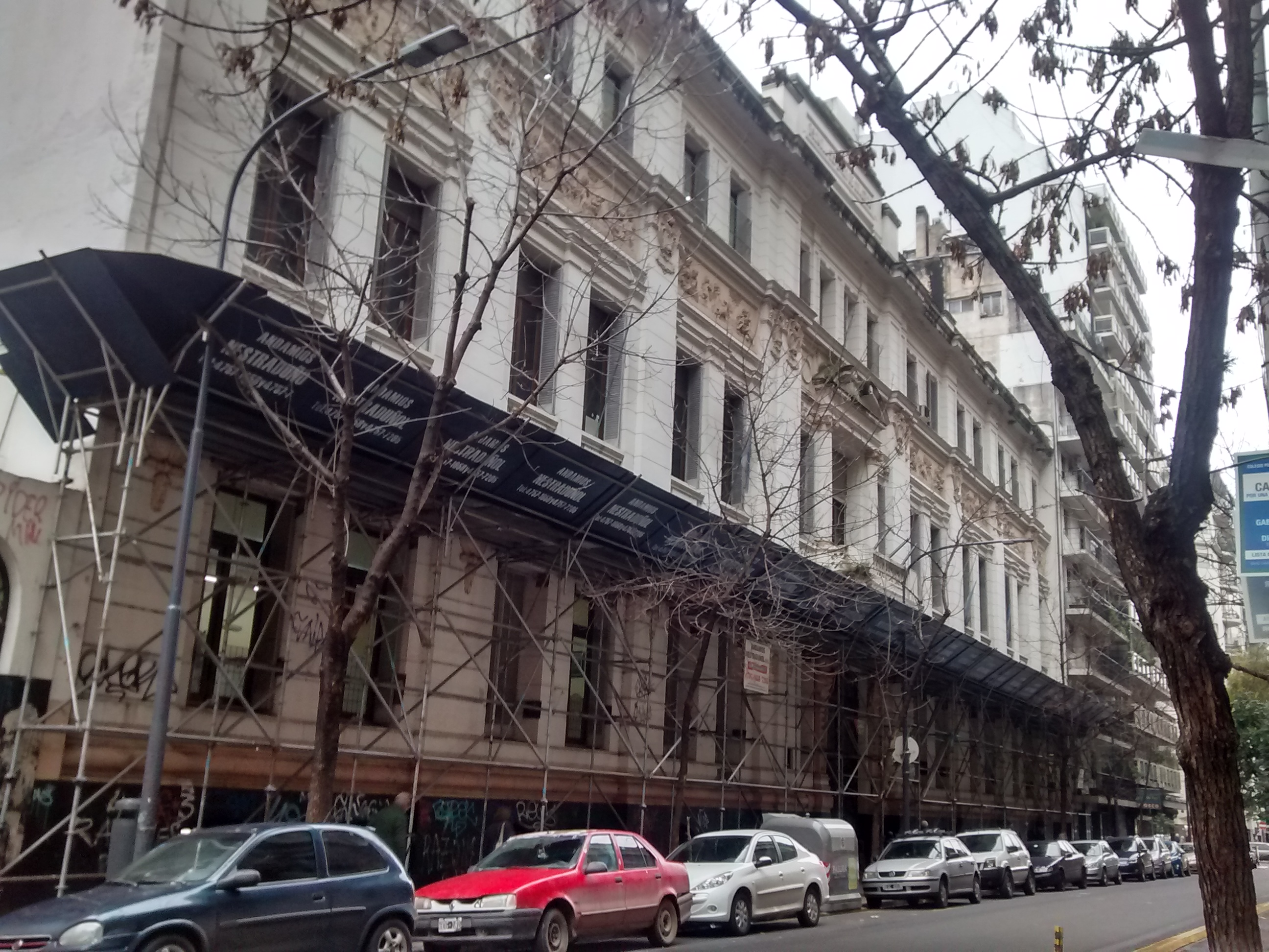 Fachada principal de la Escuela Superior de Comercio Carlos Pellegrini en julio de 2016, con andamios protectores durante tareas de restauración.